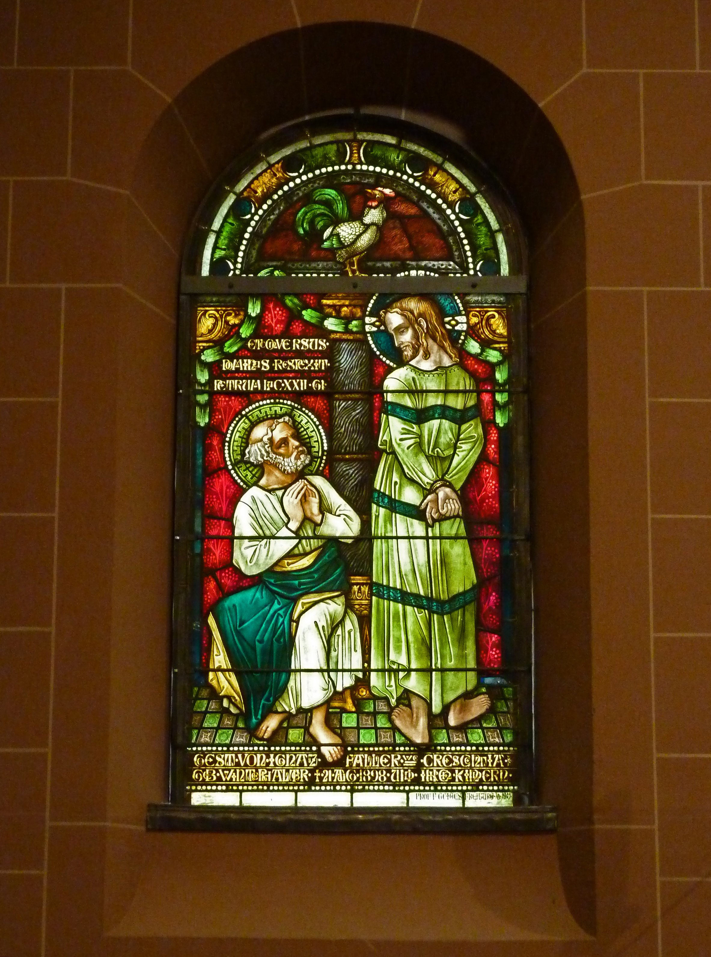 Darstellung von Petrus als Christusverleugner an einem bunten Glasfenster von Fritz Geiges in der Johanneskirche, Freiburg im Breisgau